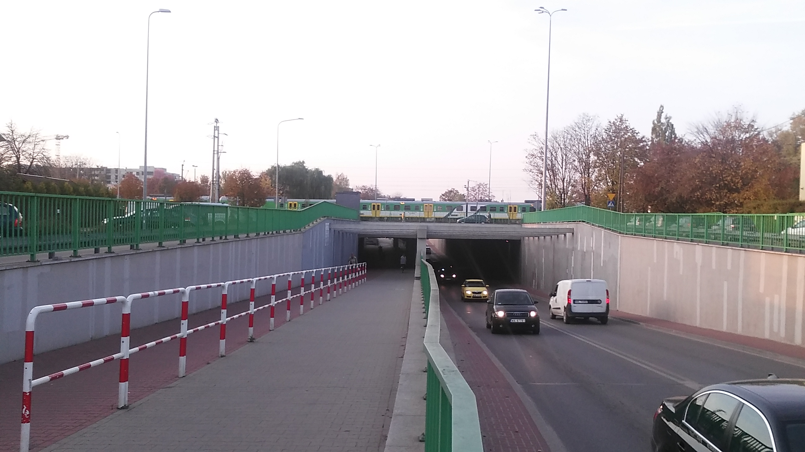 Ząbki - tunel drogowy pod torami kolejowymi sąsiadujący z przystankiem kolejowym, otwarty w 2014 r., widok od południa